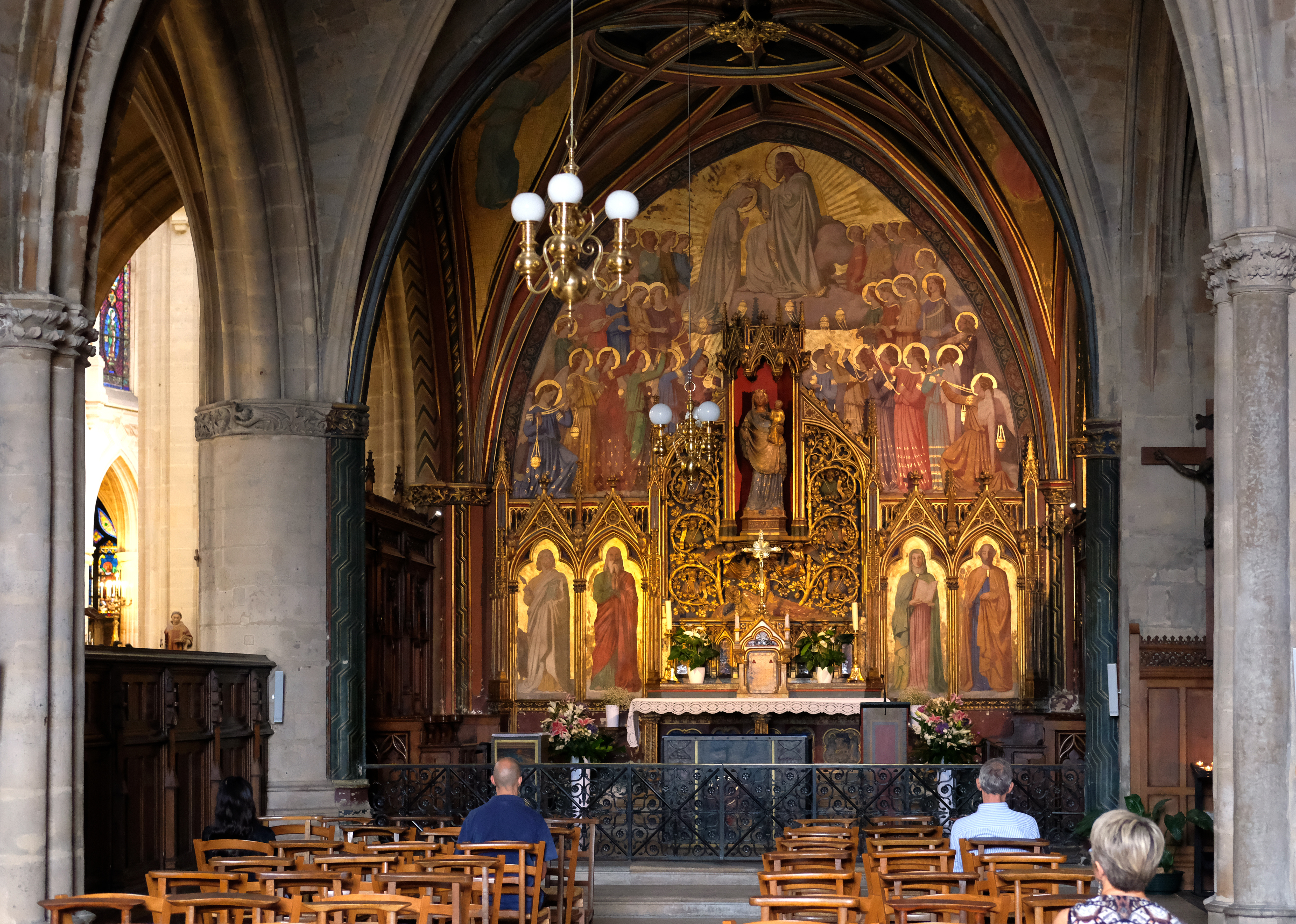 Église Saint-Germain-l'Auxerrois (chapelle de la Vierge) - Paris Ier